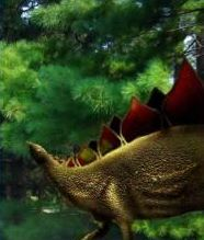 Dinosaurio ornistisquio que vivió en una época eslendorosa para su tipo.